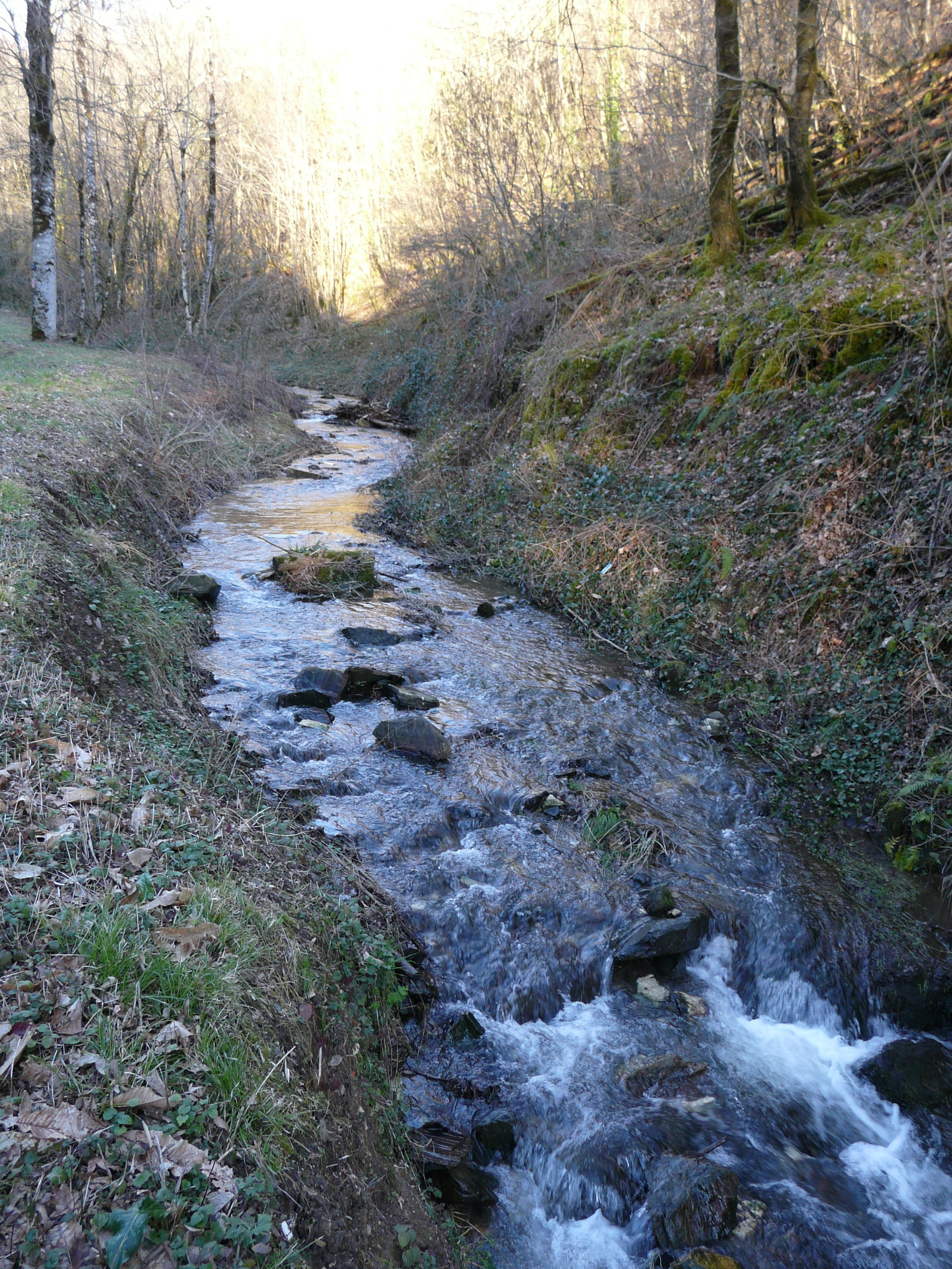 Ruisseau le Pontillou, principal cours d'eau de la commune de Clermont-d'Excideuil, Dordogne, France. Vue prise en direction de l'amont.